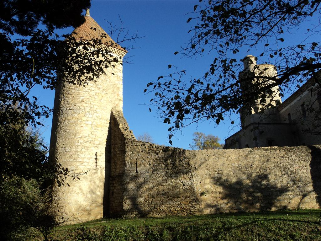 Château de Belflou (Aude)